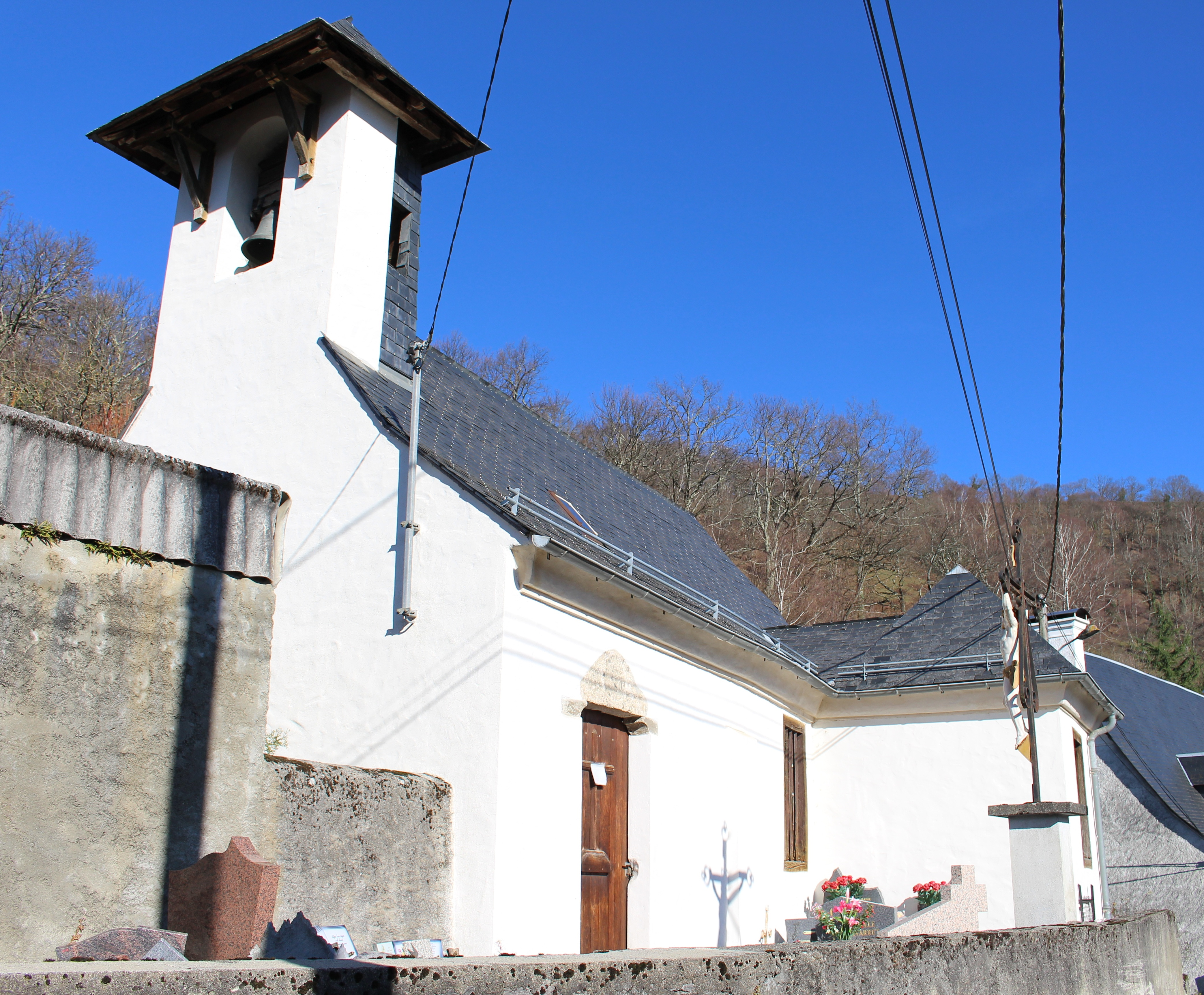 Église de la Toussaint de Justous (Hautes-Pyrénées)